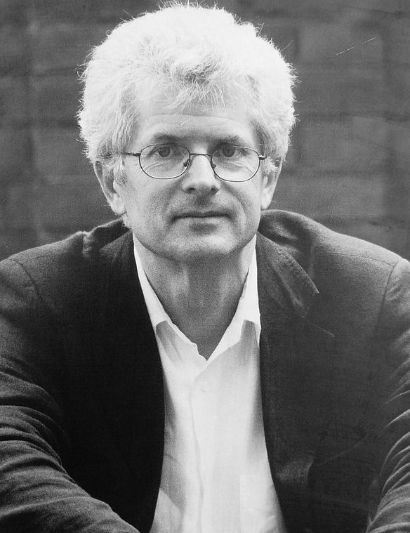 Arkadiusz Rybicki, fotografia nagrobna.